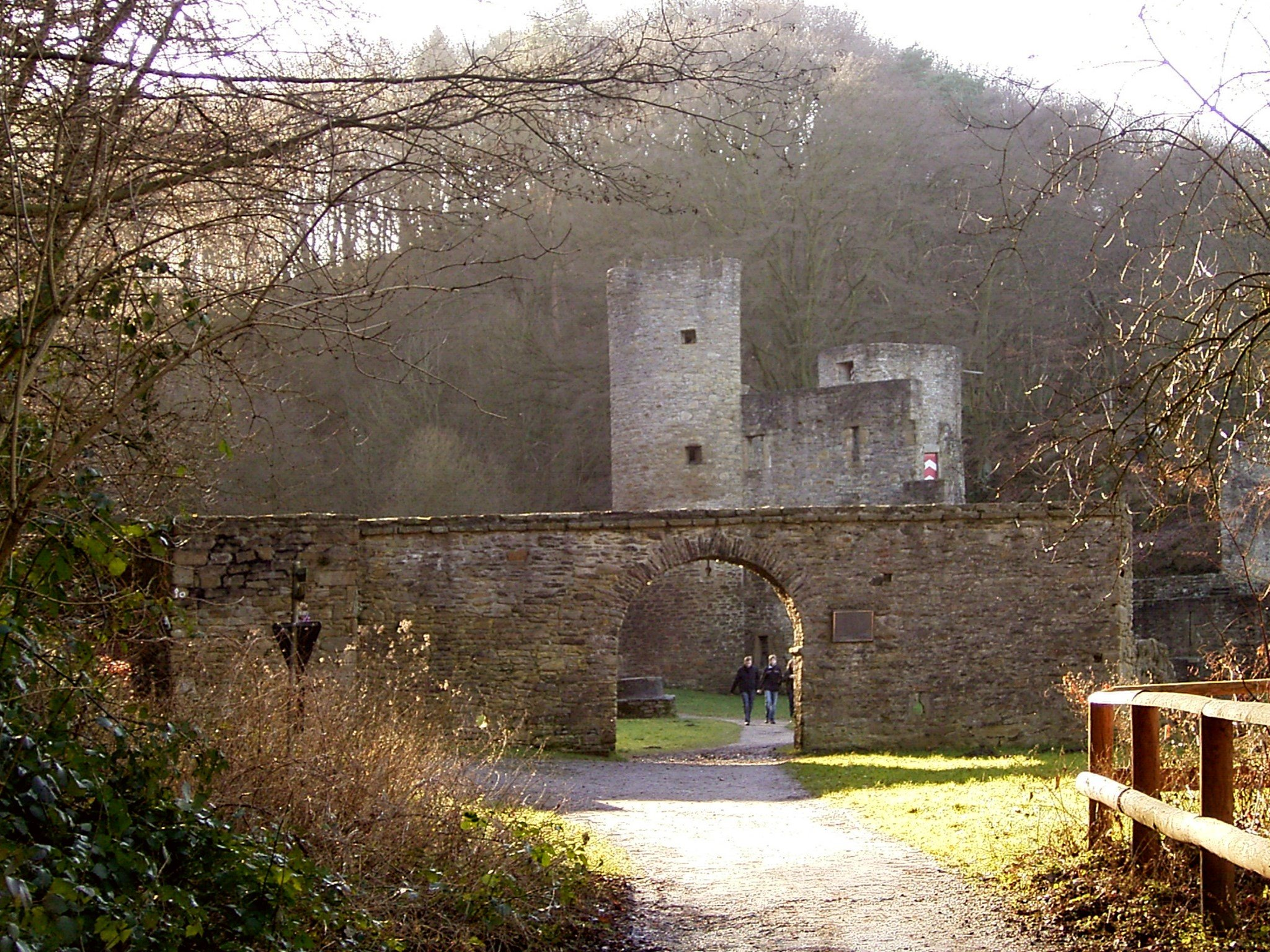 Burg Hardenstein im Muttental, Witten